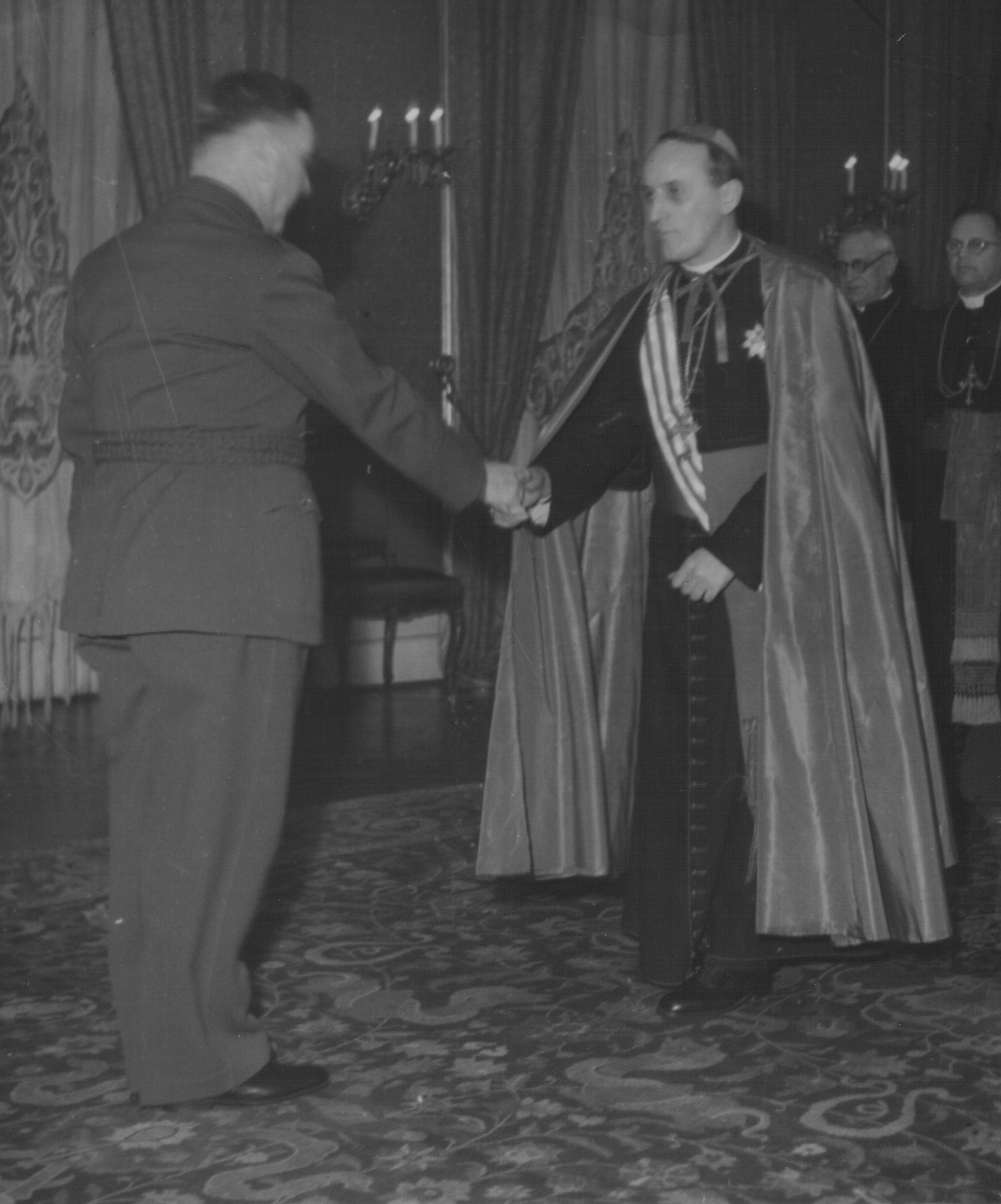 Srpskohrvatski / српскохрватски: Ante Pavelić i Alojzije Stepinac